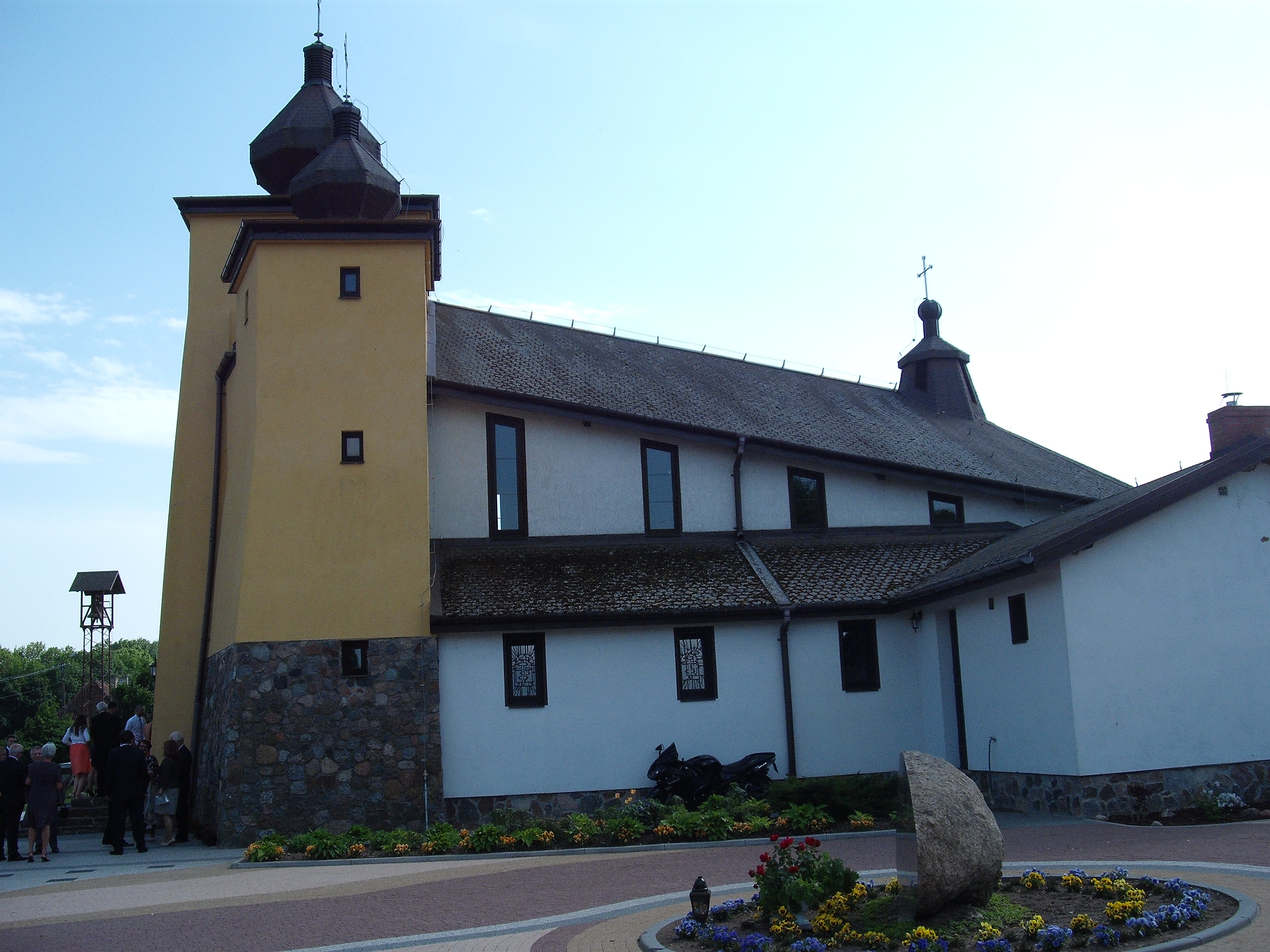 Cerkiew greckokatolicka w Kruklankach.